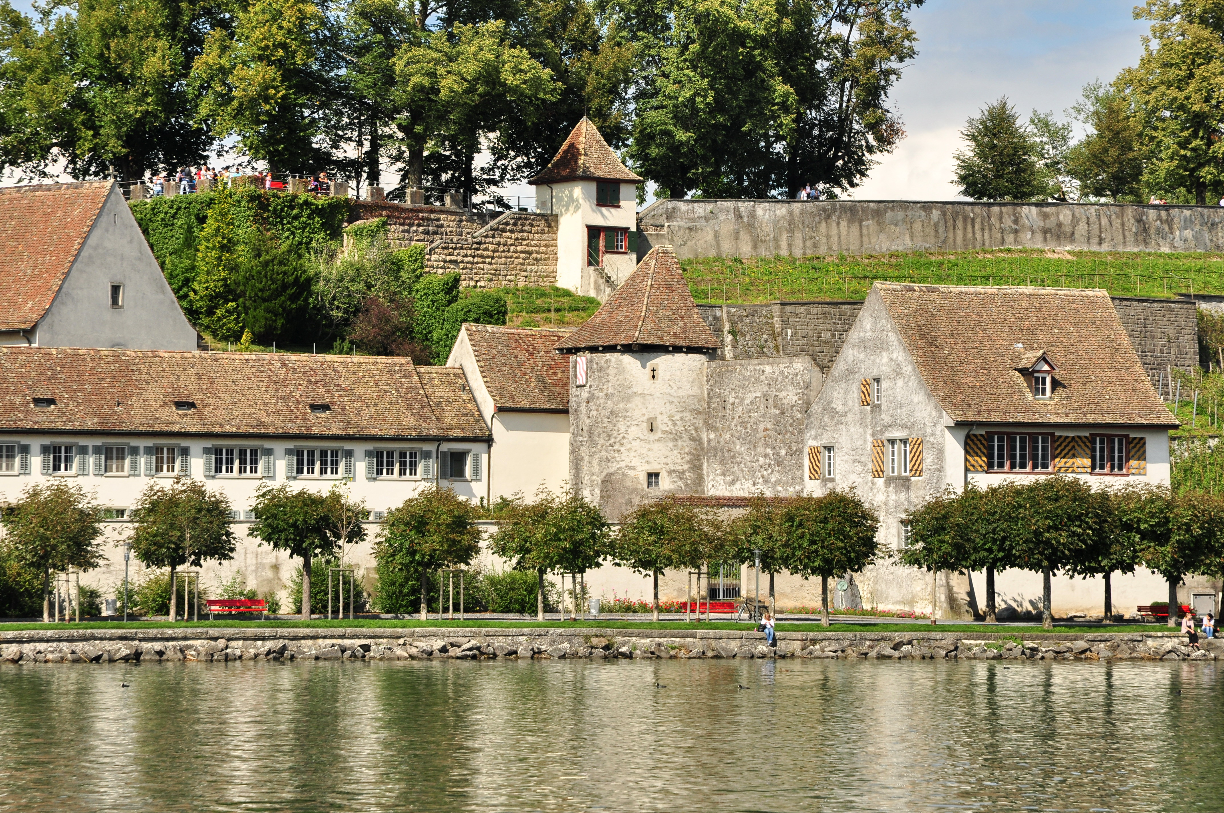 Rapperswil (Switzerland) : Lindenhof hill, Kapuzinerkloster and on lakeshore the Endingerturm tower and the Einsiedlerhaus building, as seen from Zürichsee-Schifffahrtsgesellschaft (ZSG) motorship Wädenswil.